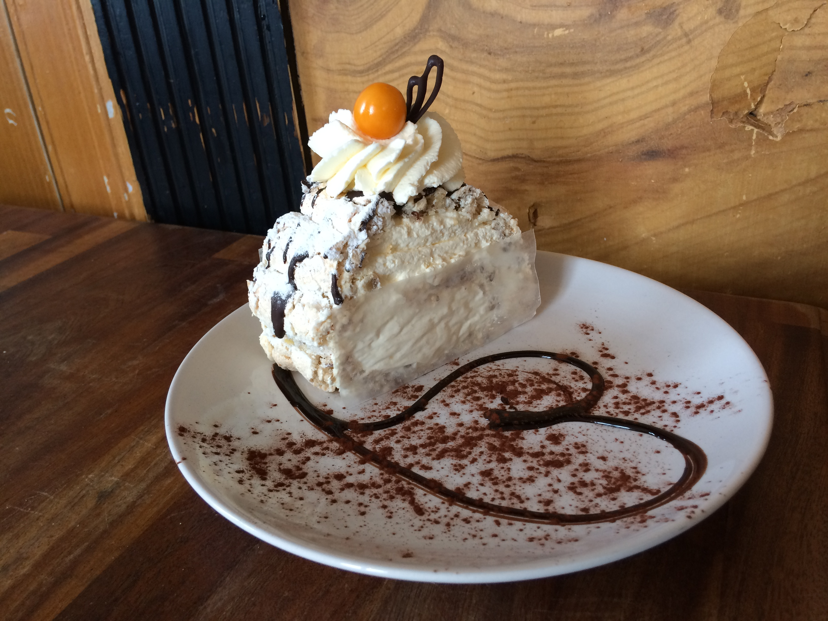 Budapestbakelse `på konditori Lyran i Skärholmen i Stockholm, söndagen den 4 mars 2018.